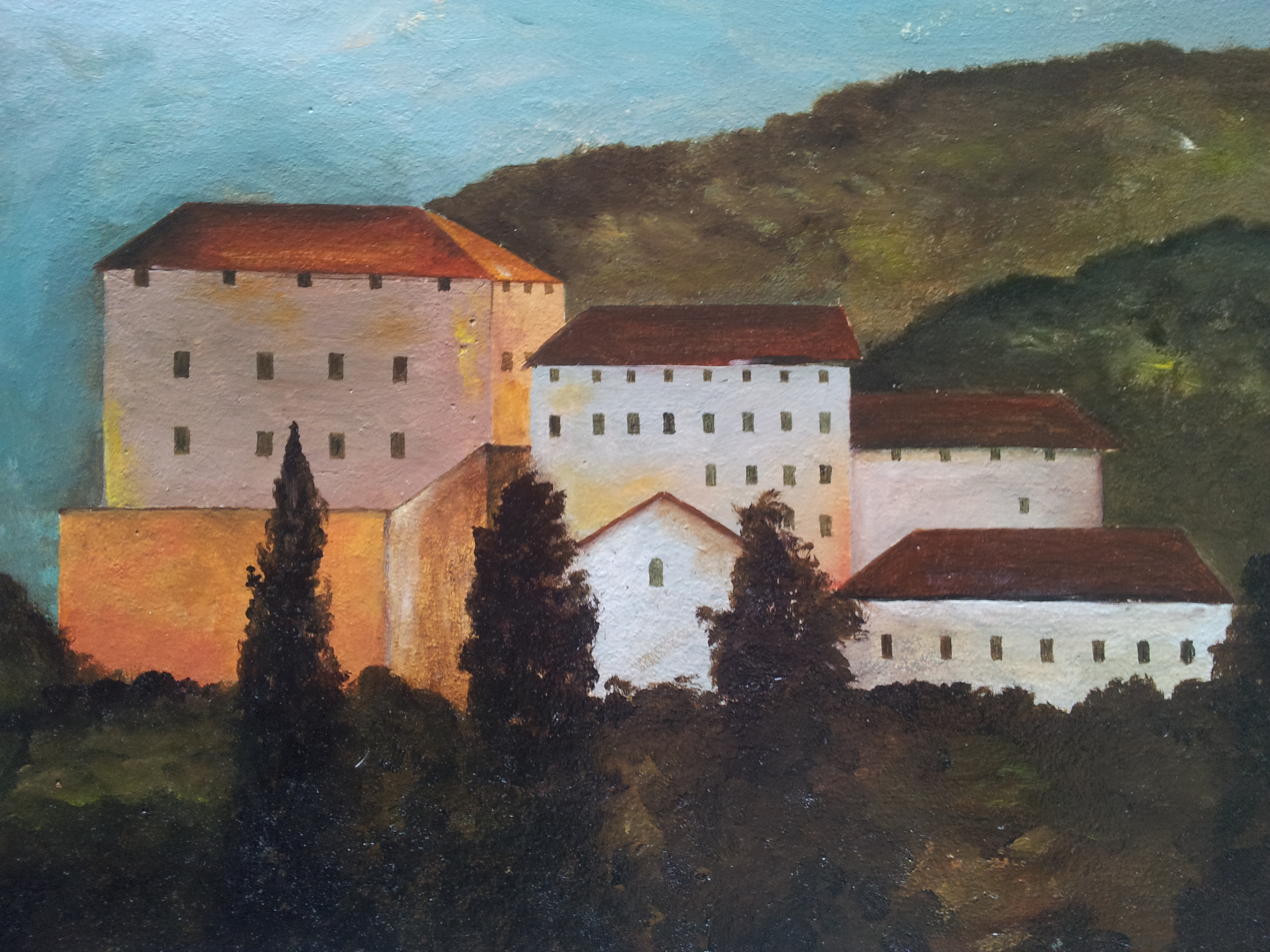 Belvedere - Immagine 2